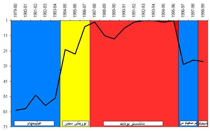 رسم بياني يُظهر المراتب التي حلت بها النوادي التي احترف معها ستيف بروس، وفقًا لكل موسم